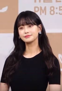 MBC 드라마 ‘하자있는 인간들’ 제작발표회가 27일 오전 서울 마포구 상암동 MBC에서 열렸다.